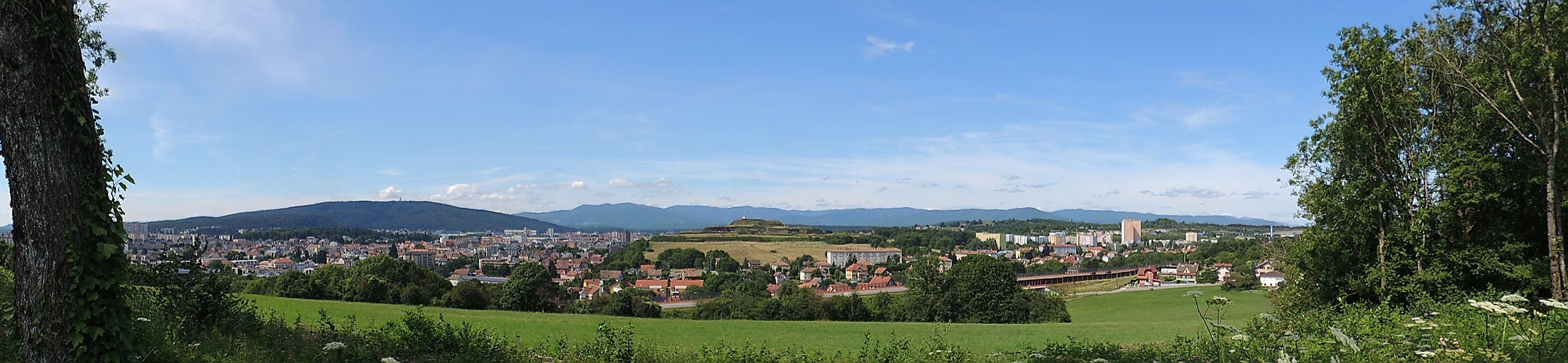 Panorama sur Belfort depuis la colline des Perches.